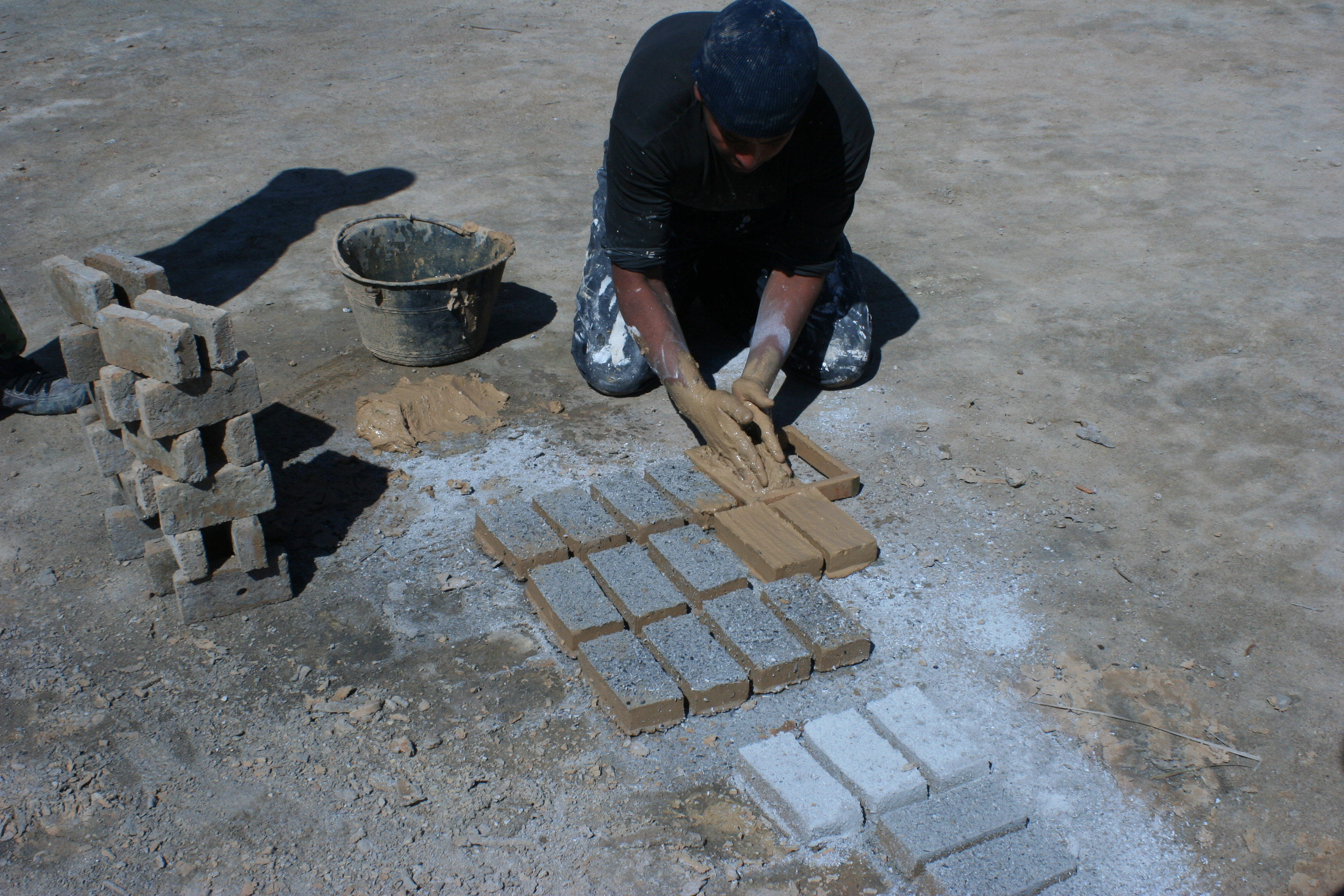 Moulage des briques de Tozeur